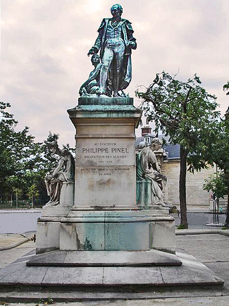 Philippe Pinel statue, Salpetriere, Paris, France